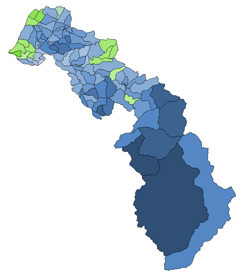 顏色對照表